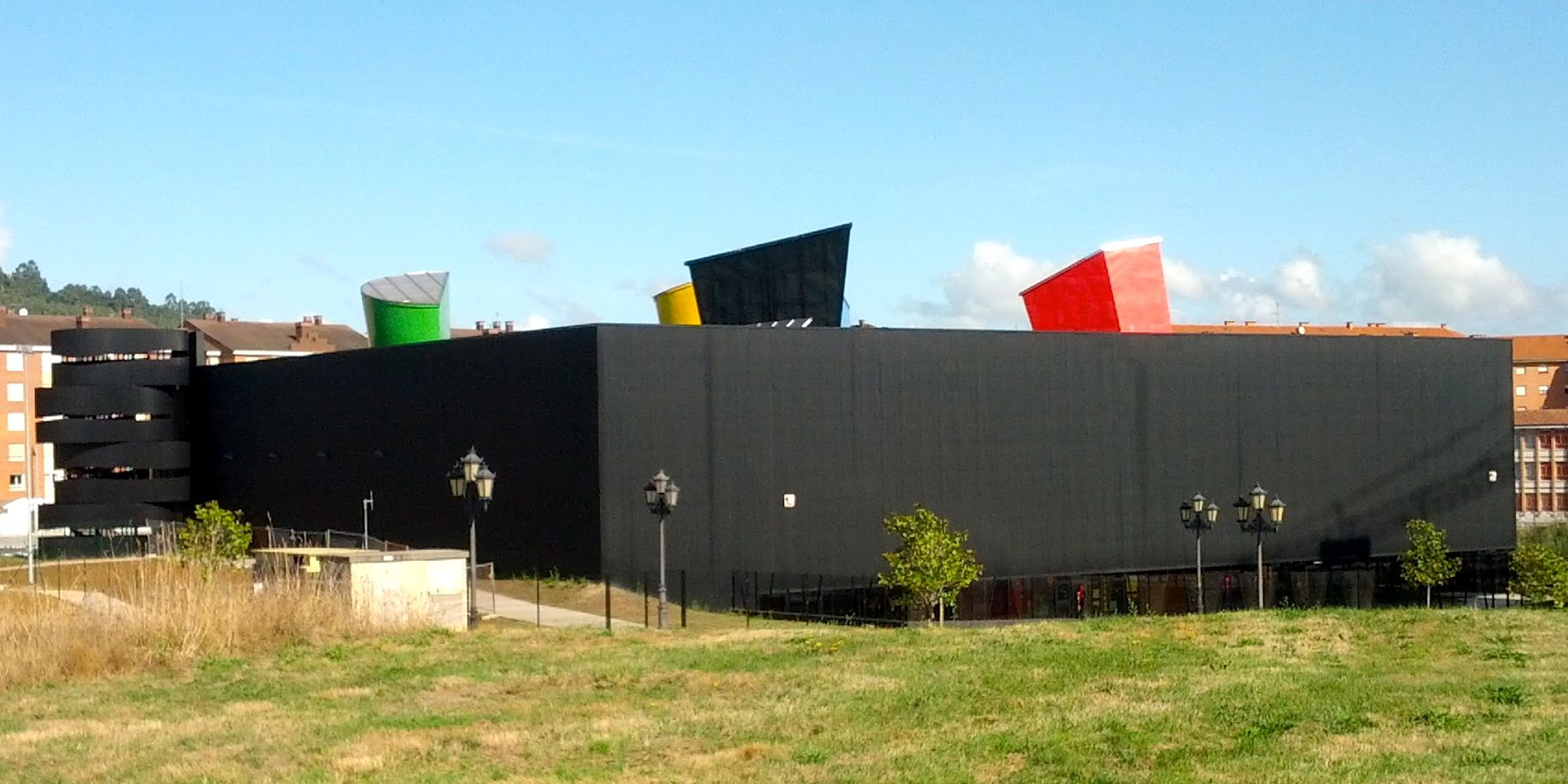 Polideportivo Corredoria Arena en La Corredoria-Oviedo (Asturias, España)